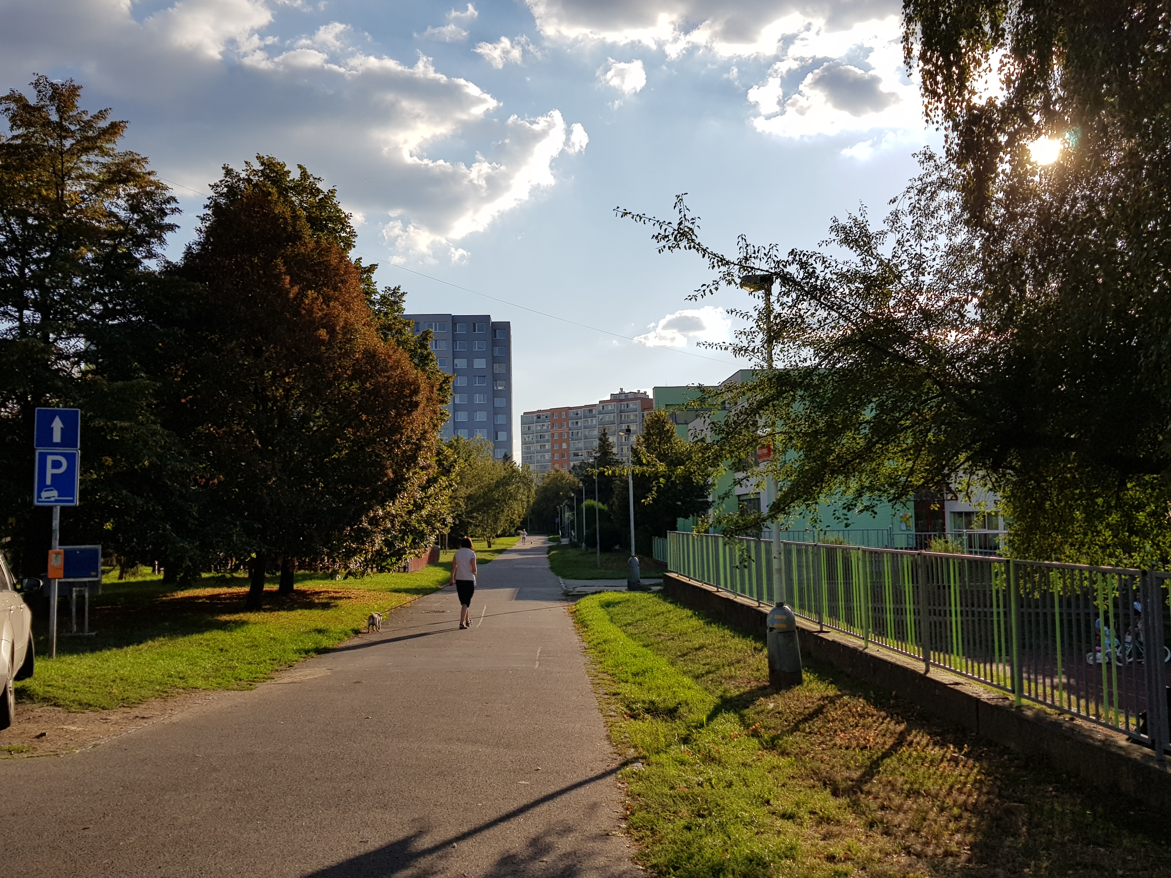 Ulice Chvaletická, Praha 14 - Lehovec, pohled jihozápadním směrem, vpravo školní areál